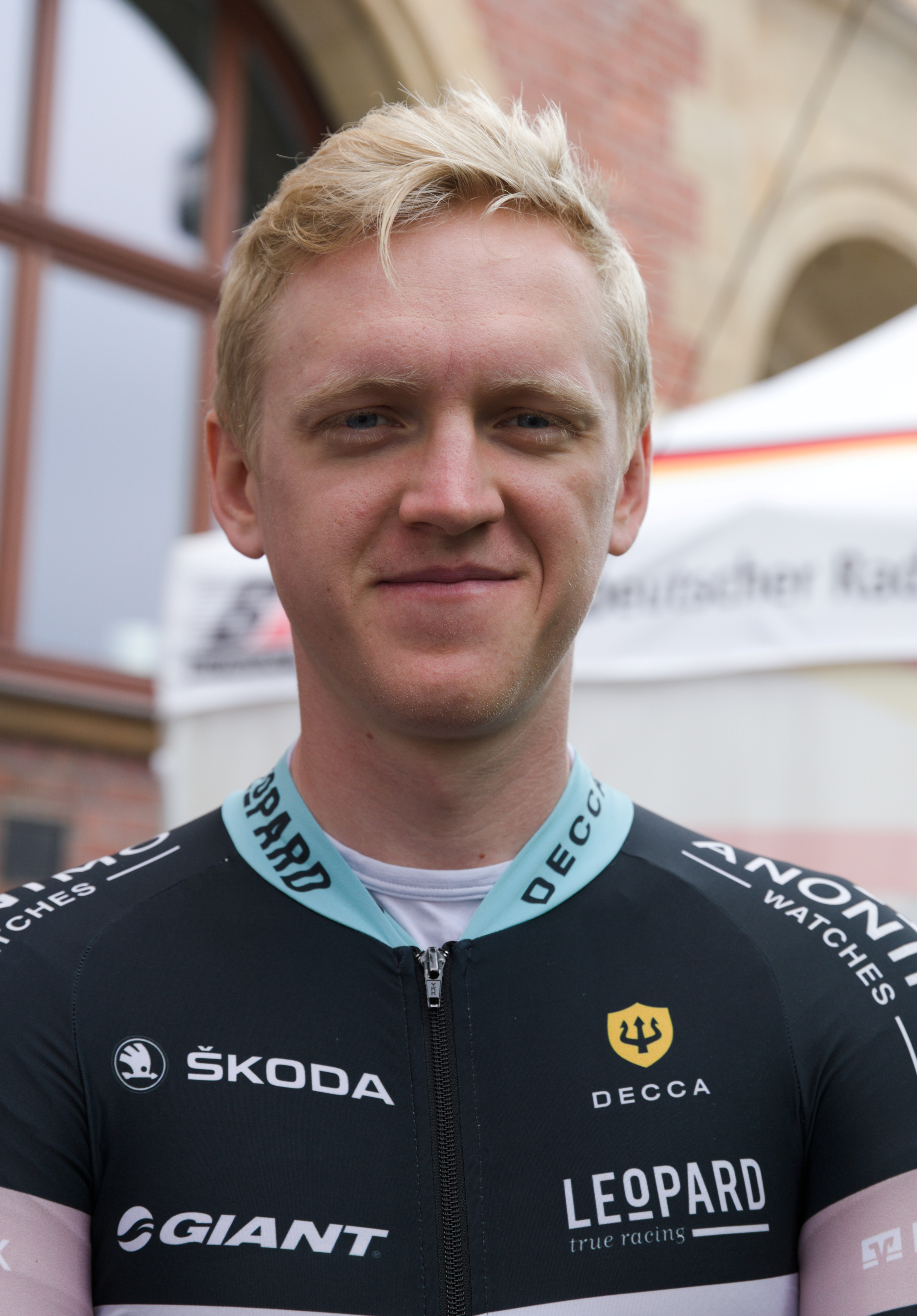 Szymon Rekita, polnischer Radsportler